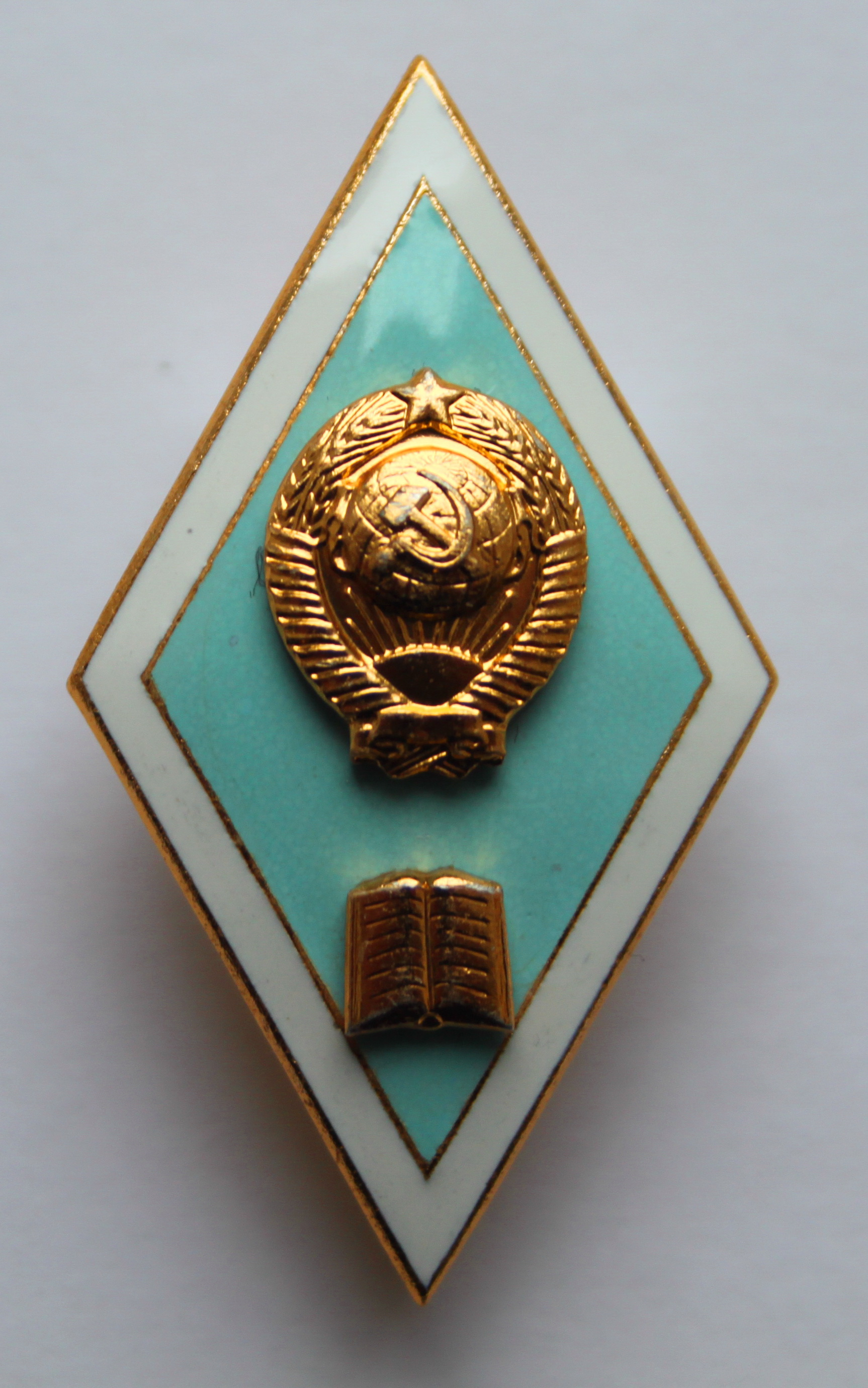 Нагрудний знак. Вища педагогічна або бібліотечна освіта СРСР